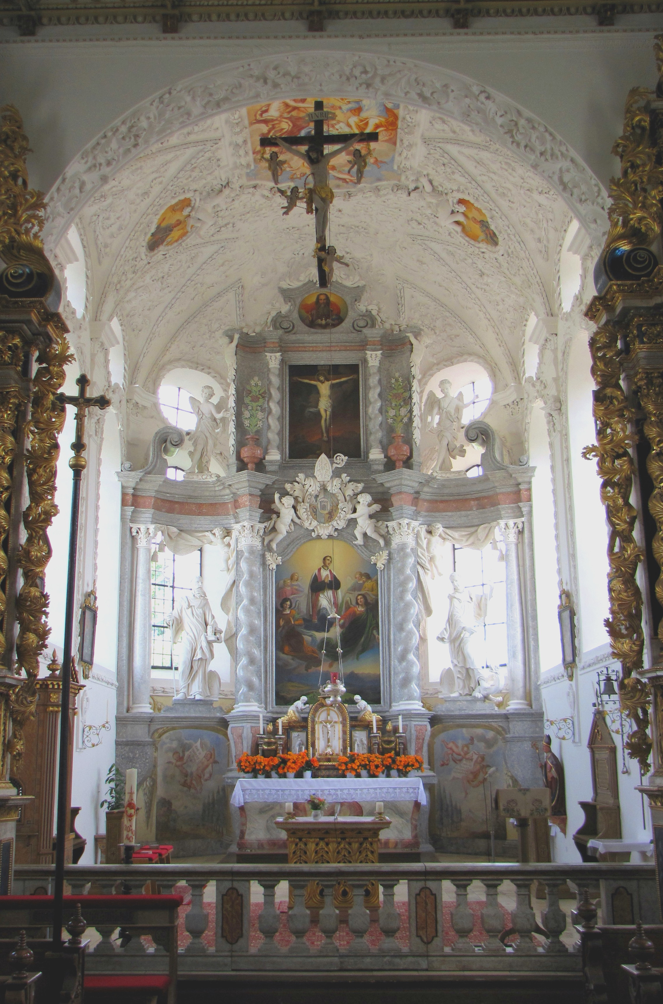 Blick in den Chor der Kirche St. Alban in Görwangs, Gemeinde Aitrang